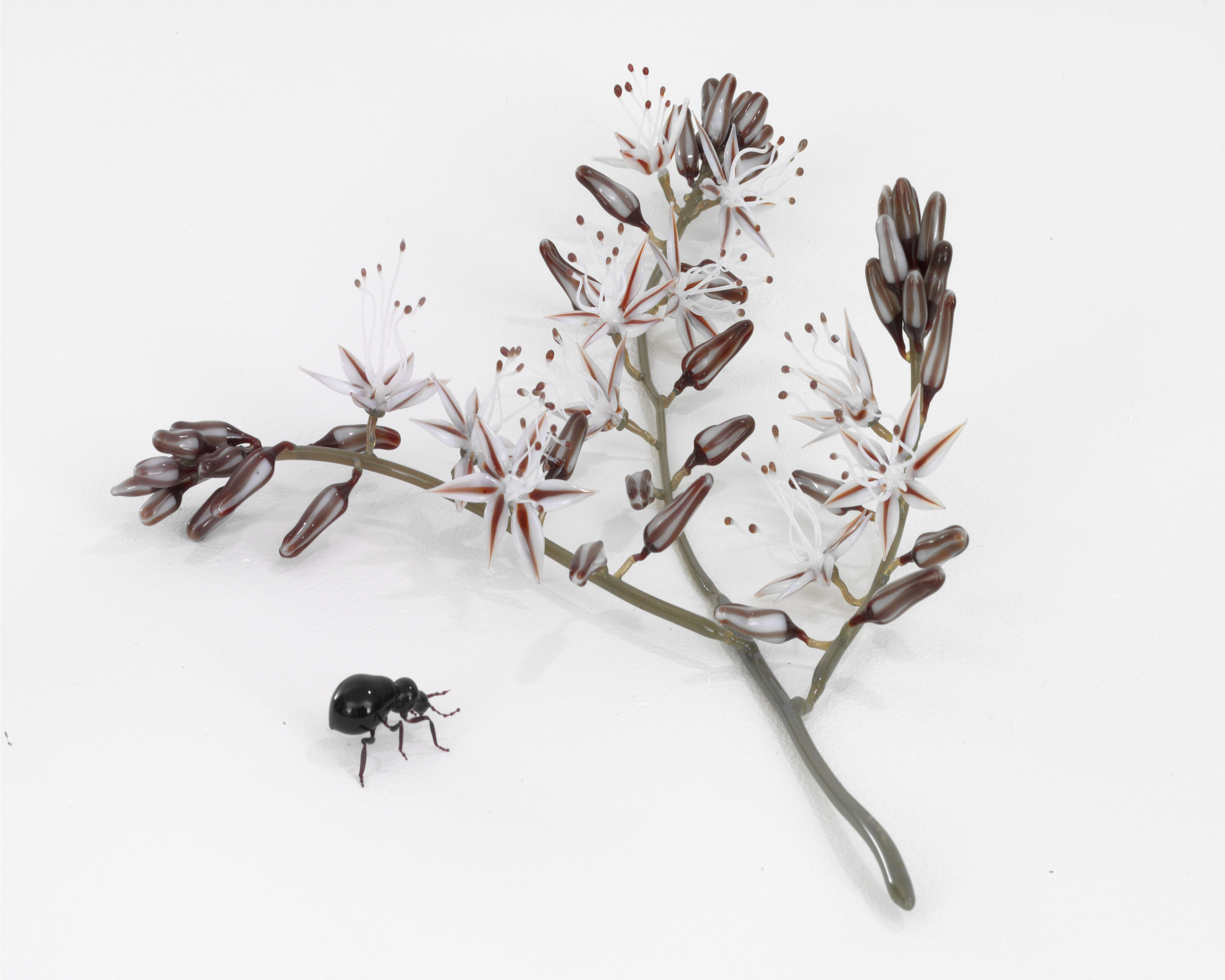 . פרט מתוך הסדרה מאנטיס רלגיוסה,זכוכית